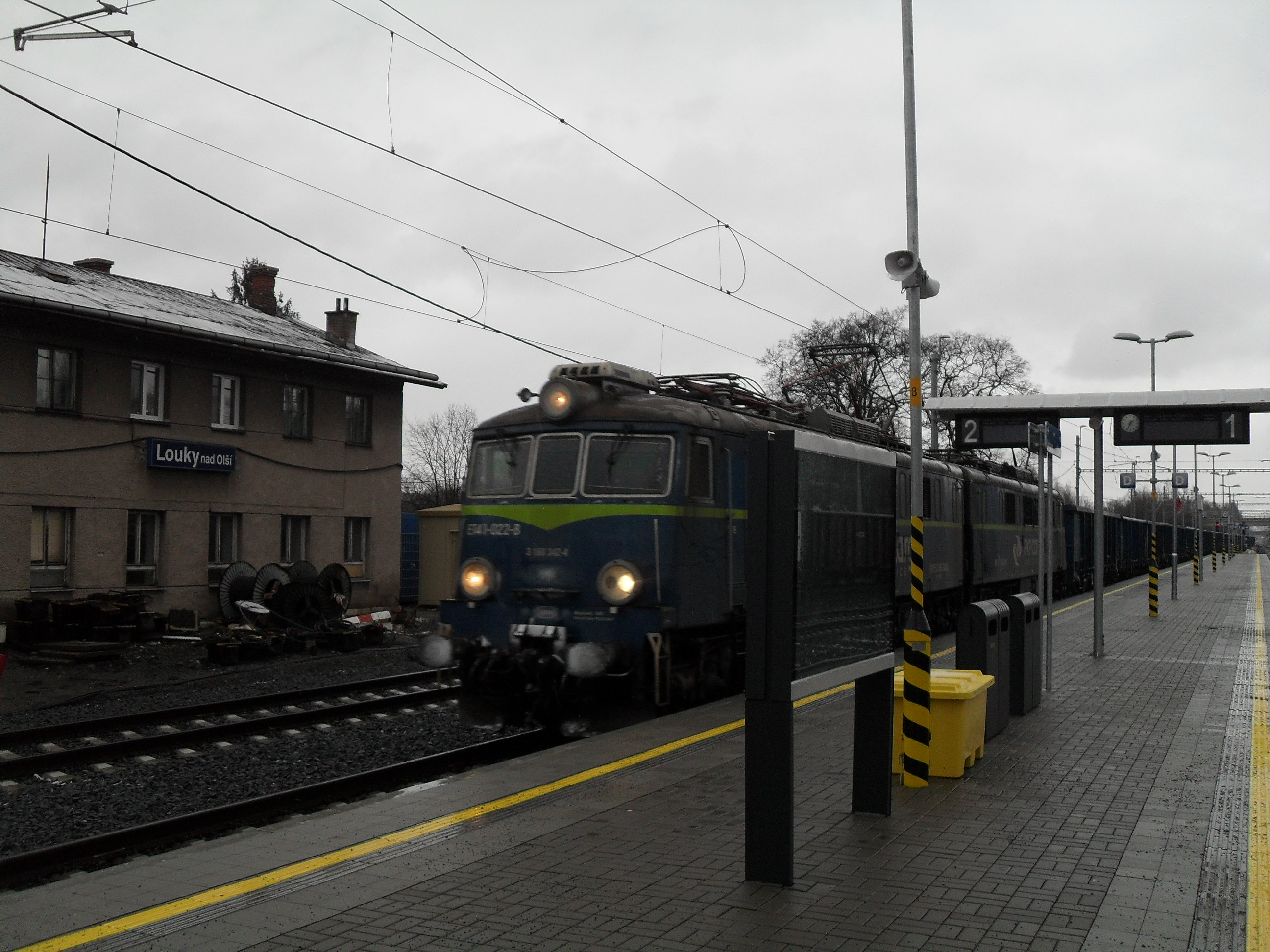 Nádraží Košicko-bohumínské dráhy v Karviné - Loukách